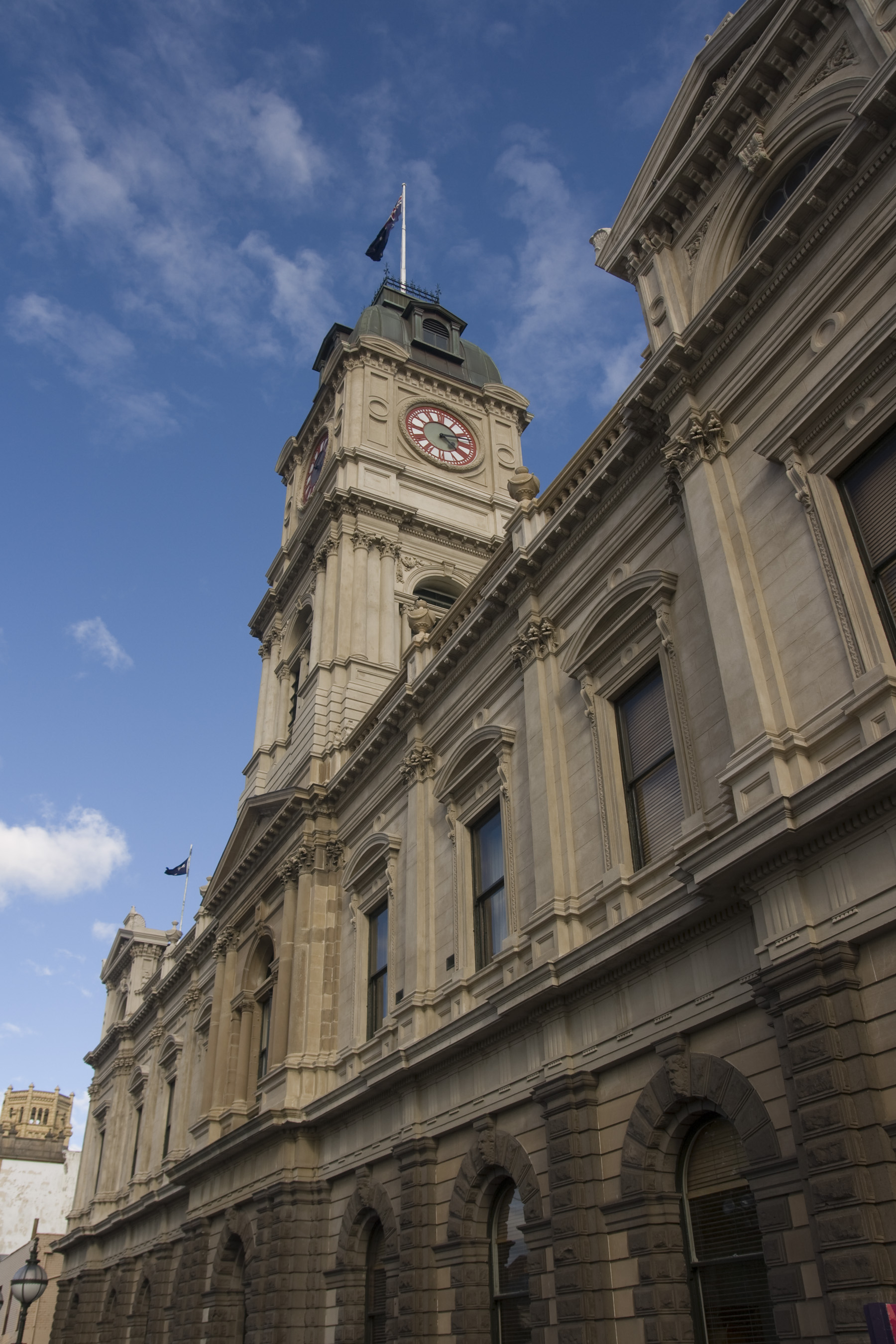 Ballarat Central VIC 3350, Australia